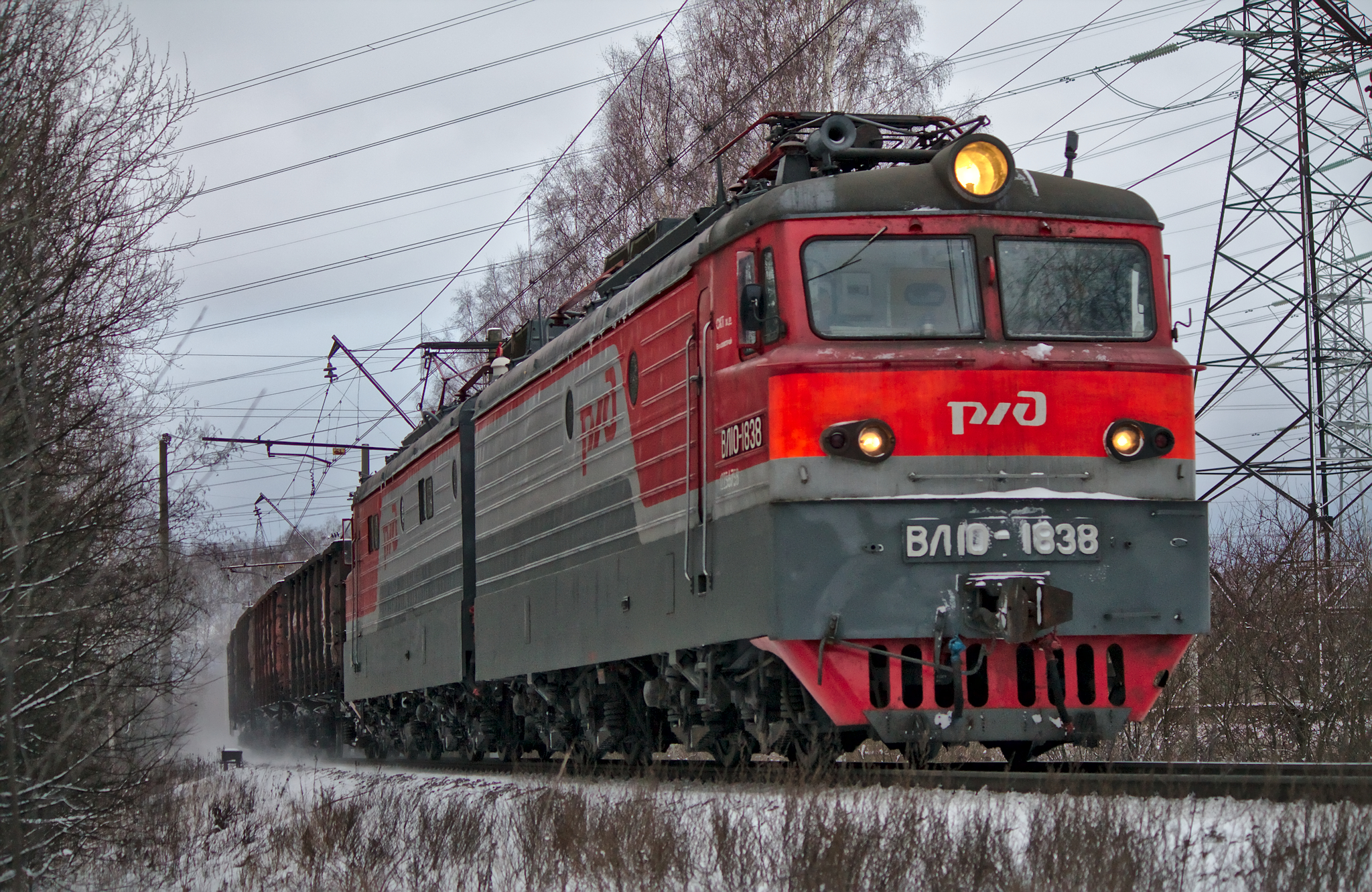 ВЛ10-1838, Парголово - Парнас. см. фото 560247 в альбоме автора